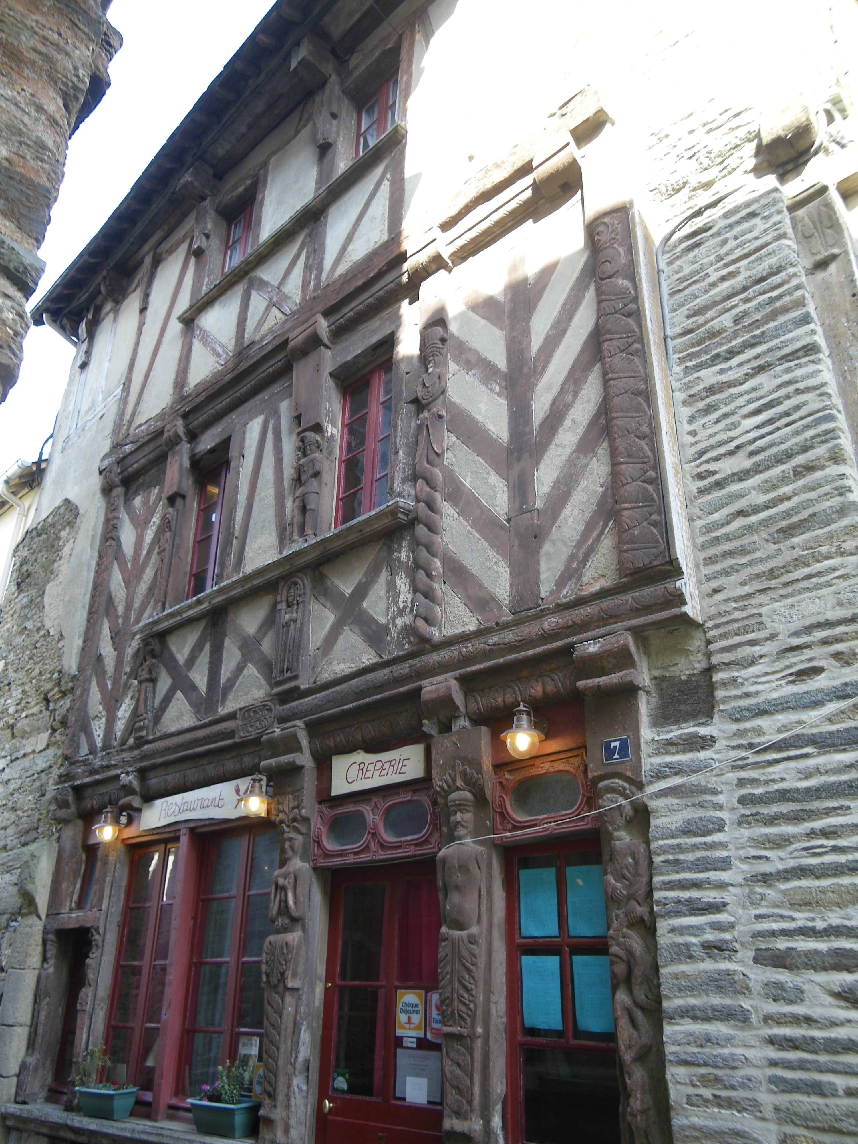 maison ancienne a ploermel